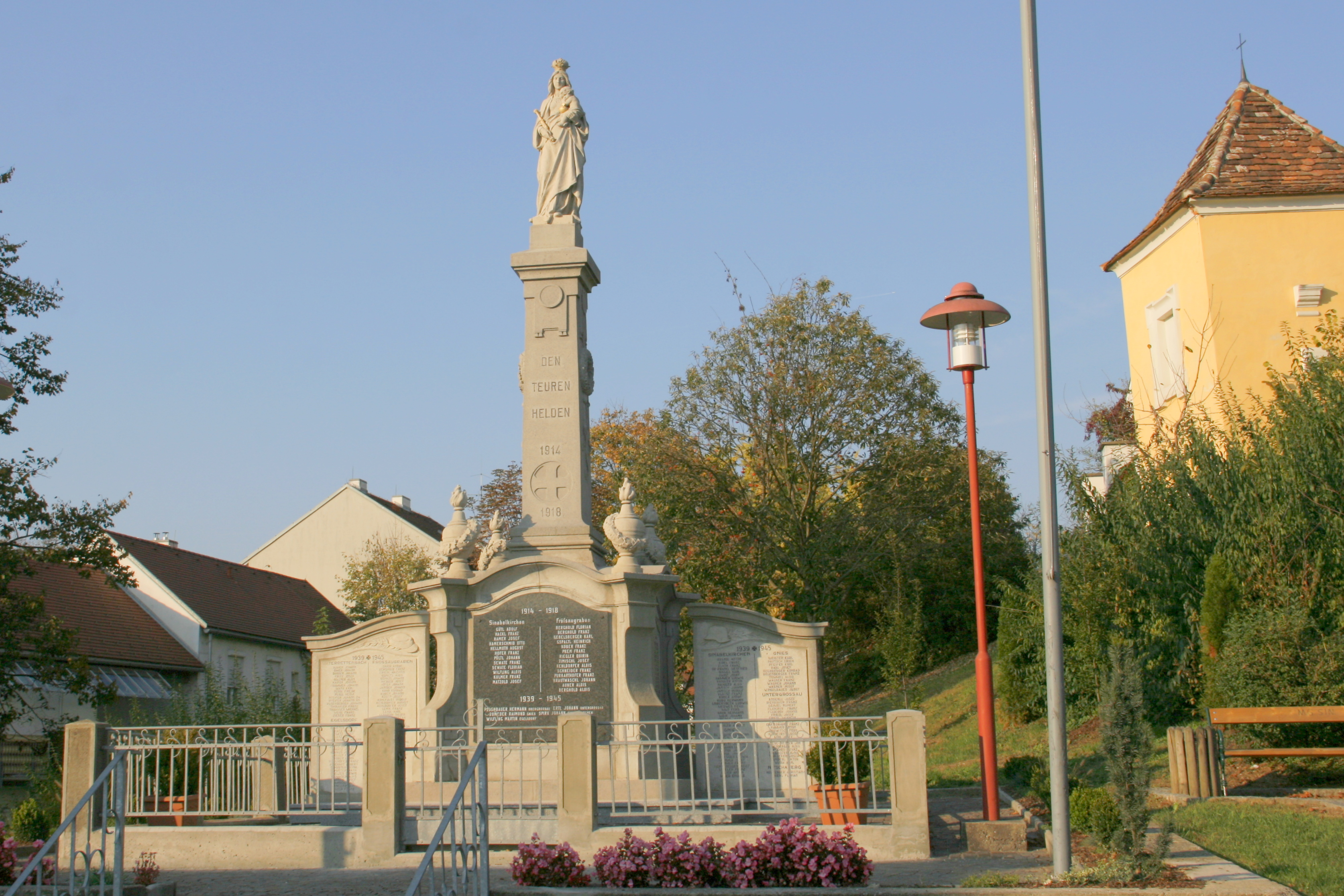 Kriegerdenkmal